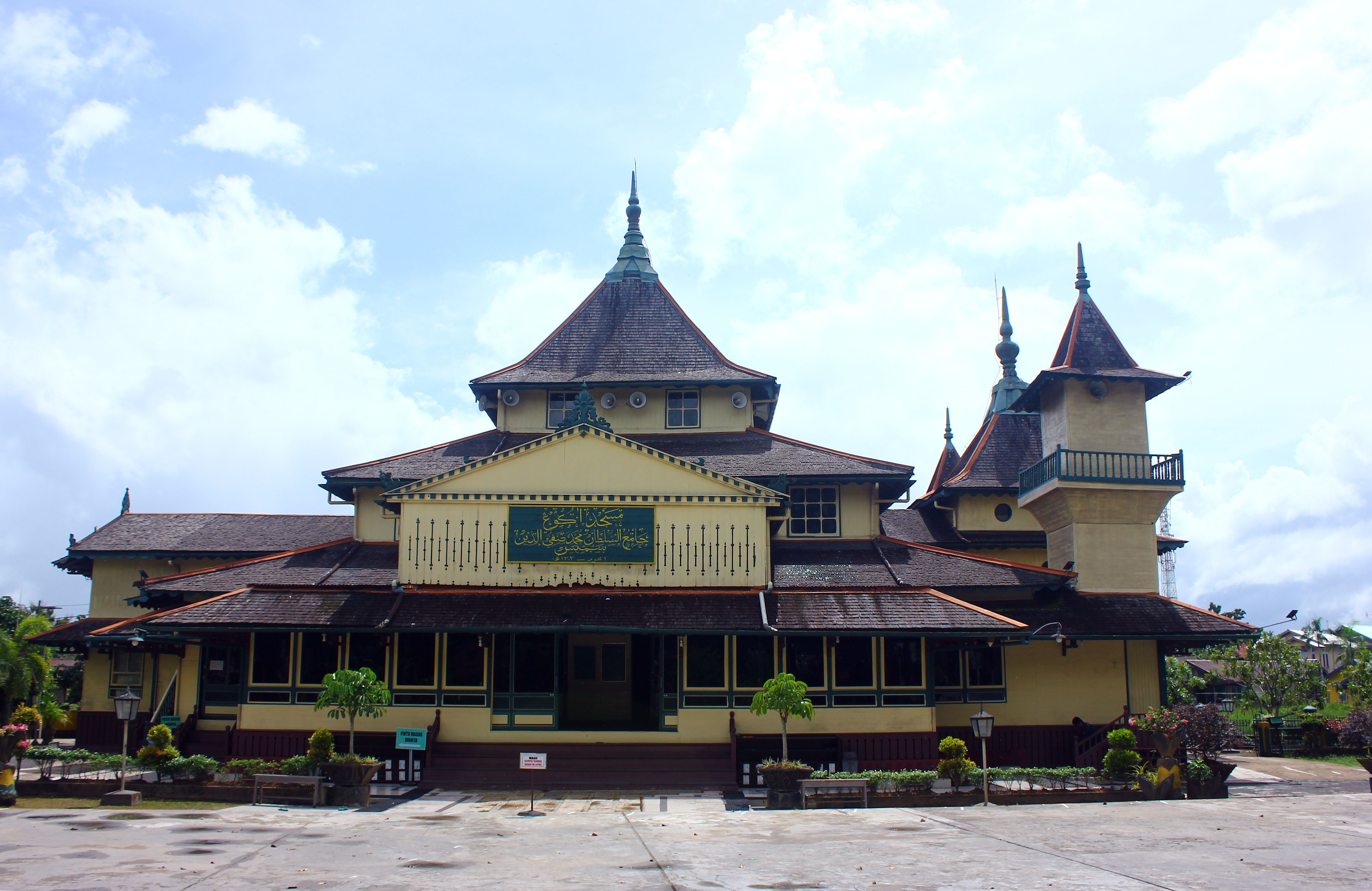 Masjid ini dibangun pada masa pemerintahan Sultan Muhammad Shafiuddin II. Letaknya di sebelan kanan atau selatan alun-alun Kesultanan Sambas. Masjid ini terdiri dari dua (2) tingkat dan di dalamnya disangga oleh delapan (8) buah tiang dari kayu belian yang ukurannya besar.